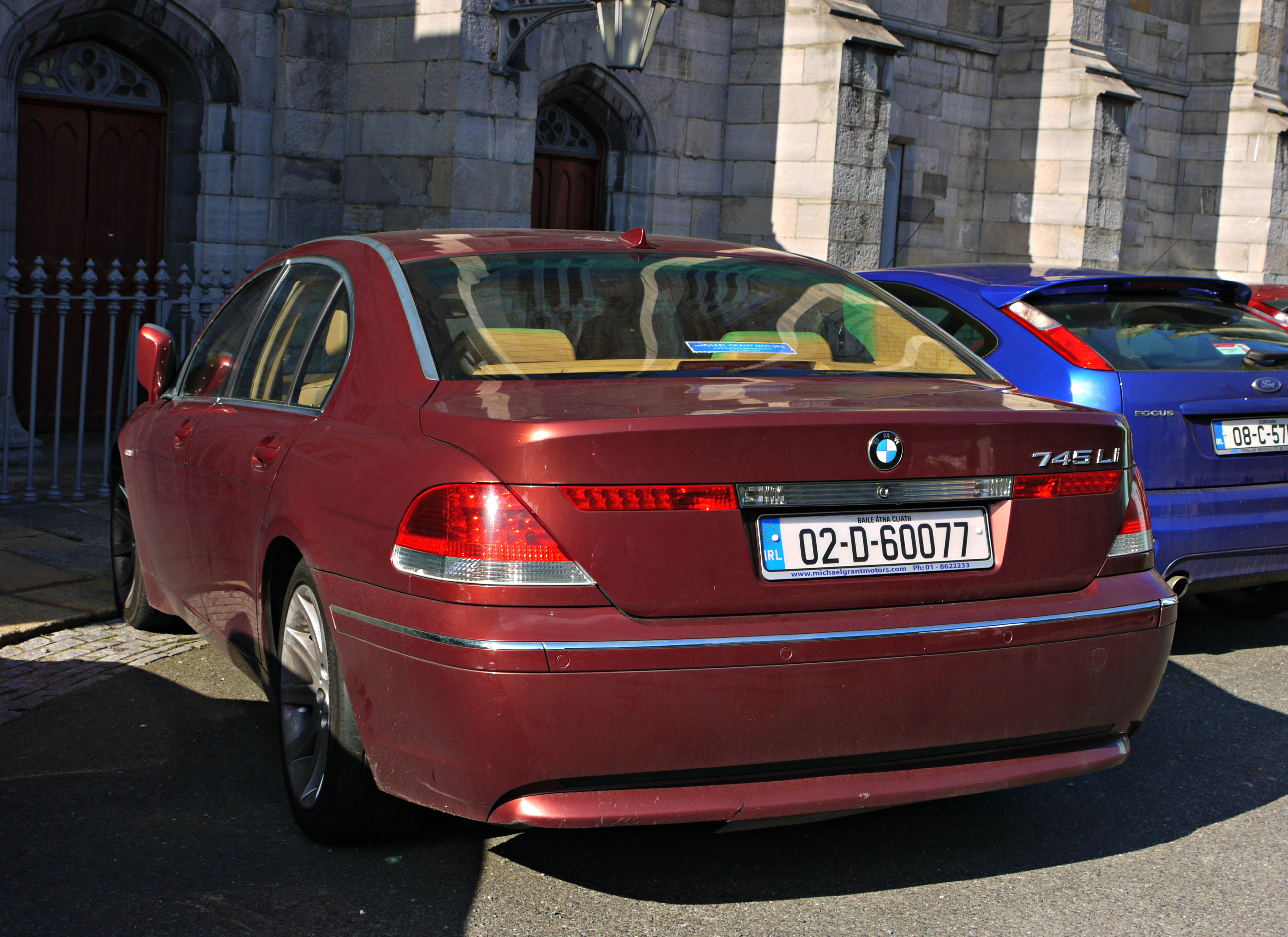 2002 BMW 745 Li V8 4.4 L